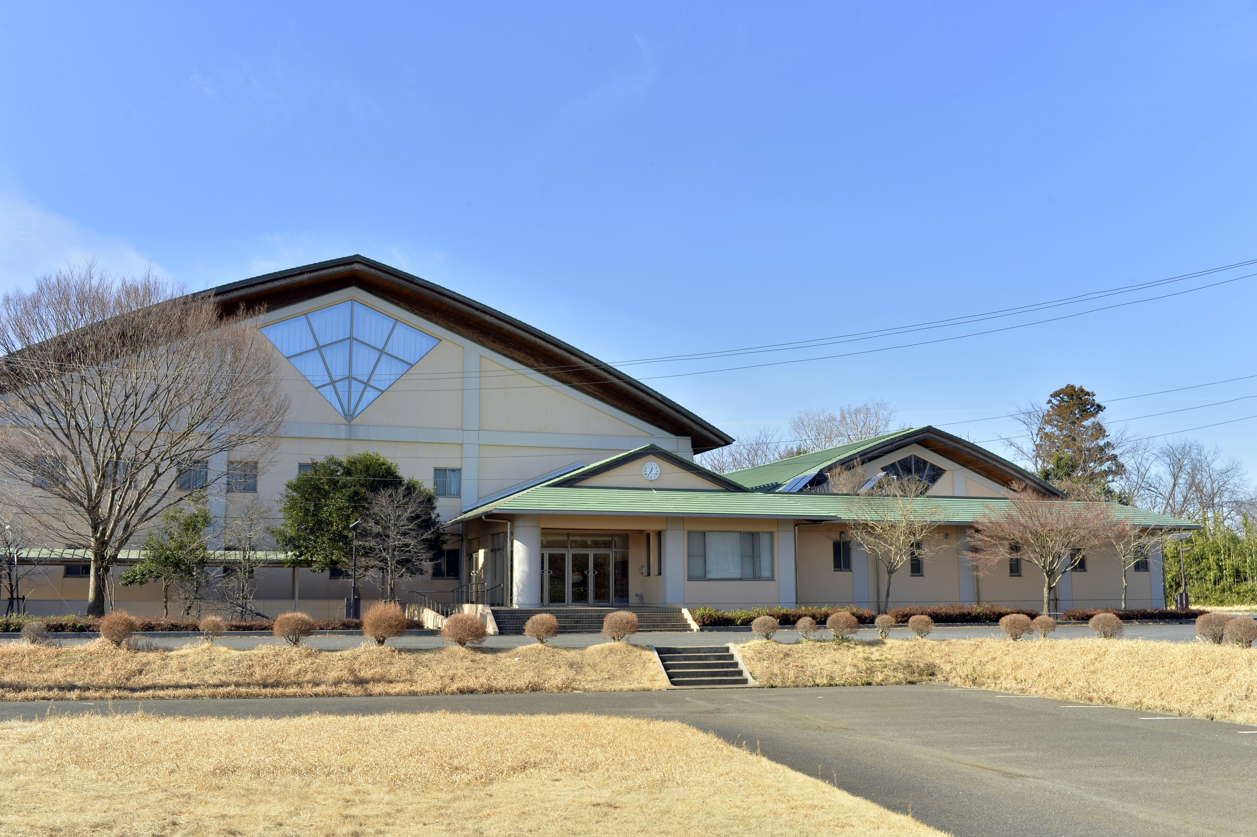 つくば市立筑波西中学校の屋内運動場